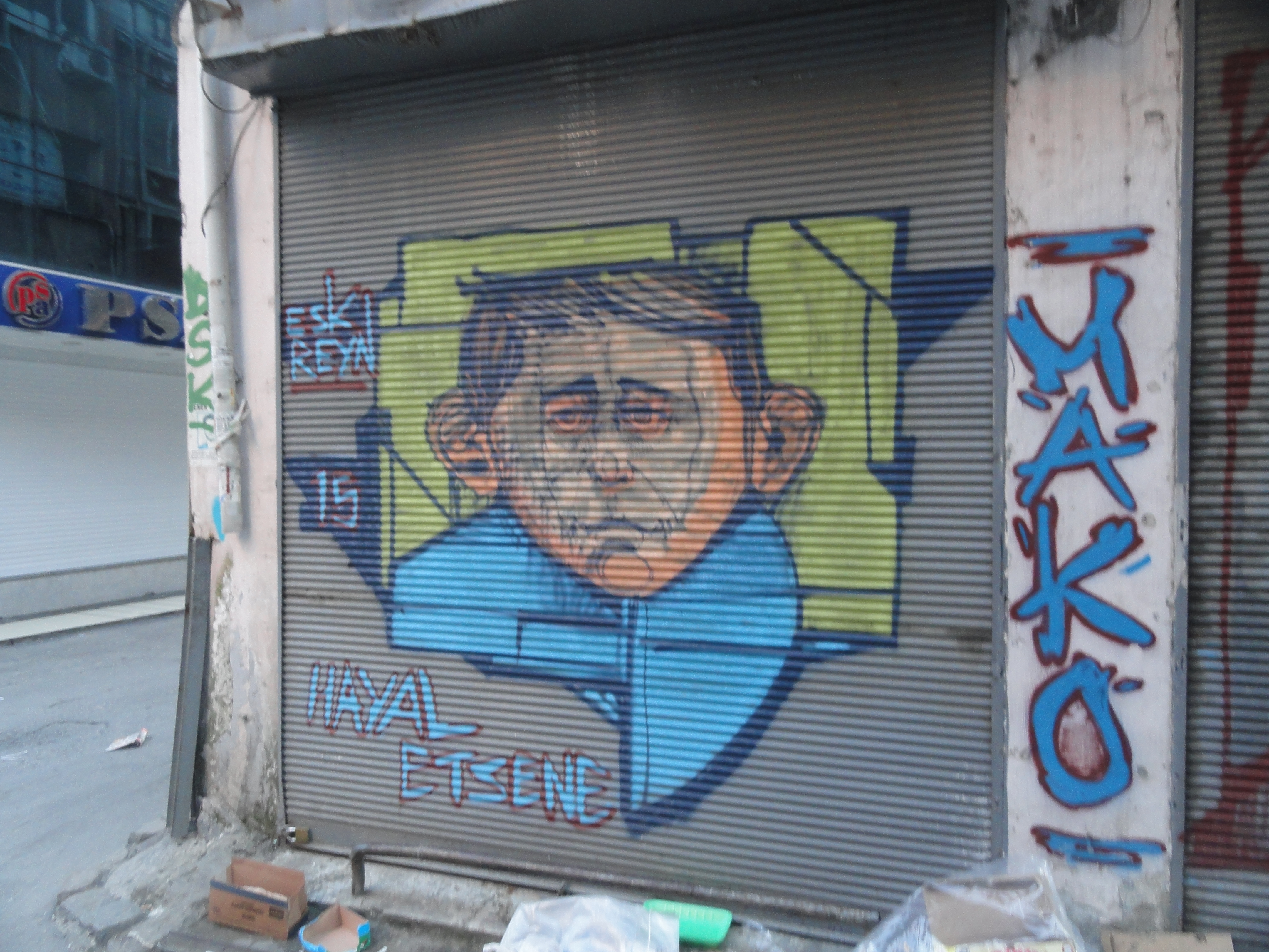 Karakoy, Istanbul, 2015